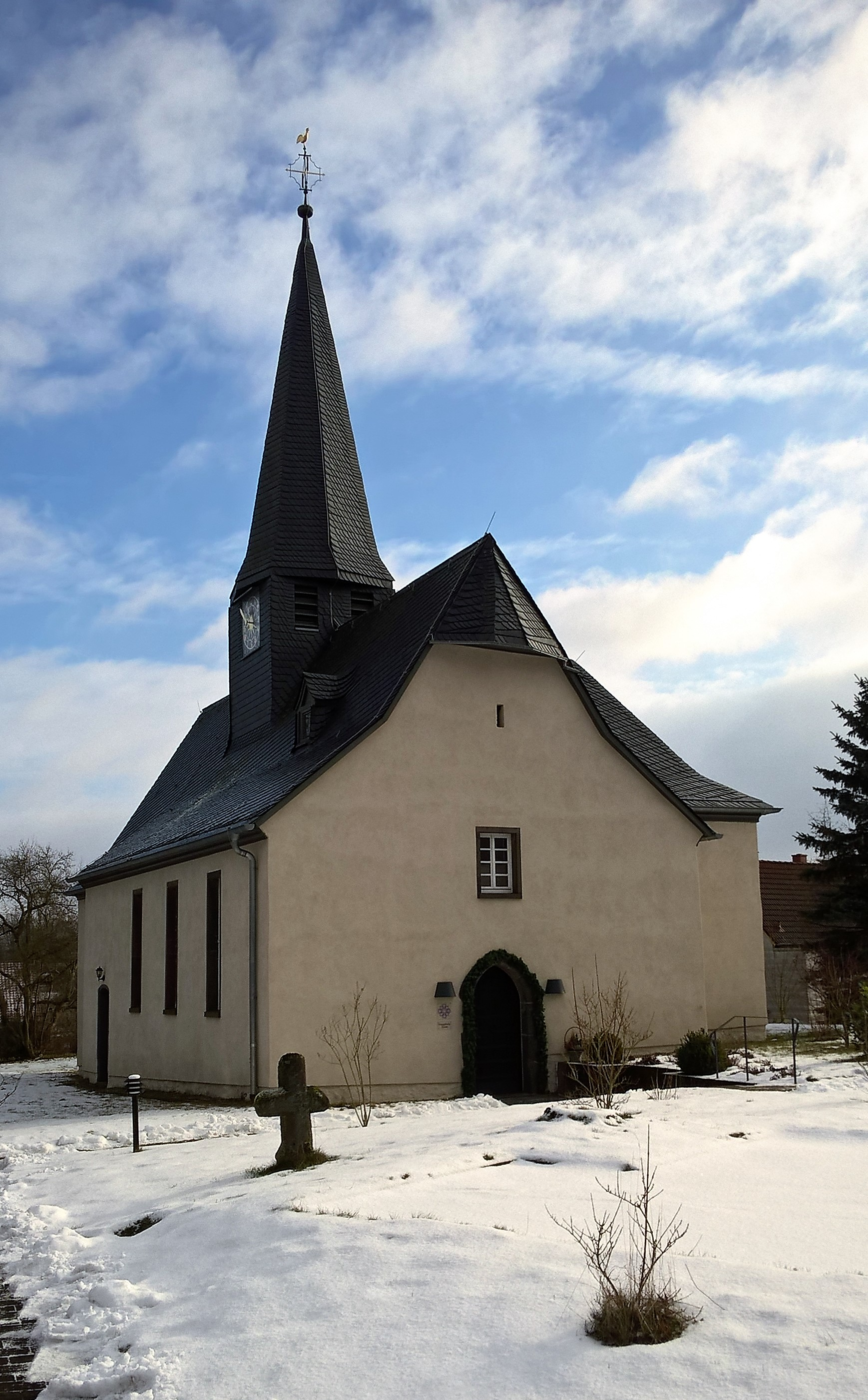 Evangelische Kirche Flensungen, Gemeinde Mücke, Vogelsbergkreis, Hessen, Deutschland